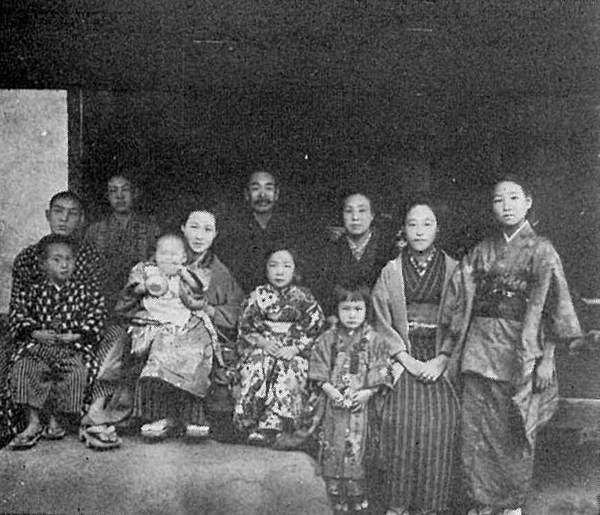 大正8年の針塚長太郎家族（上田市松尾町の自宅にて）